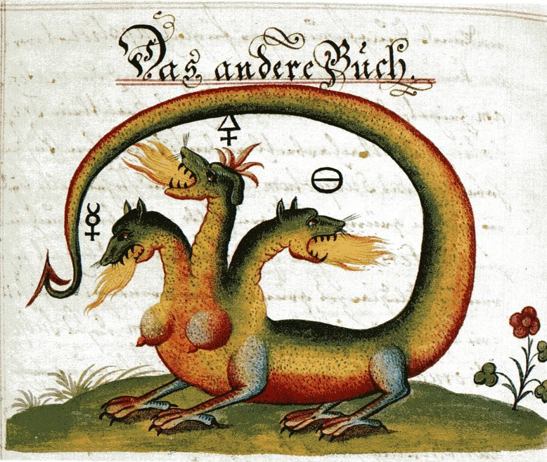 Immagine del manoscritto Zoroaster Clavis Artis, MS. Verginelli-Rota, Biblioteca dell'Accademia Nazionale dei Lincei, Roma, vol. 3, p. 34